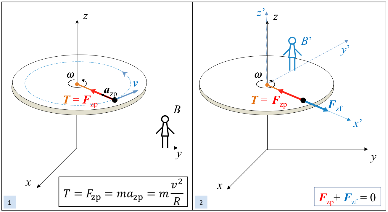 Indar zentrifugoaren eta indar zentripetuaren arteko nahasketa argitzeko eskema